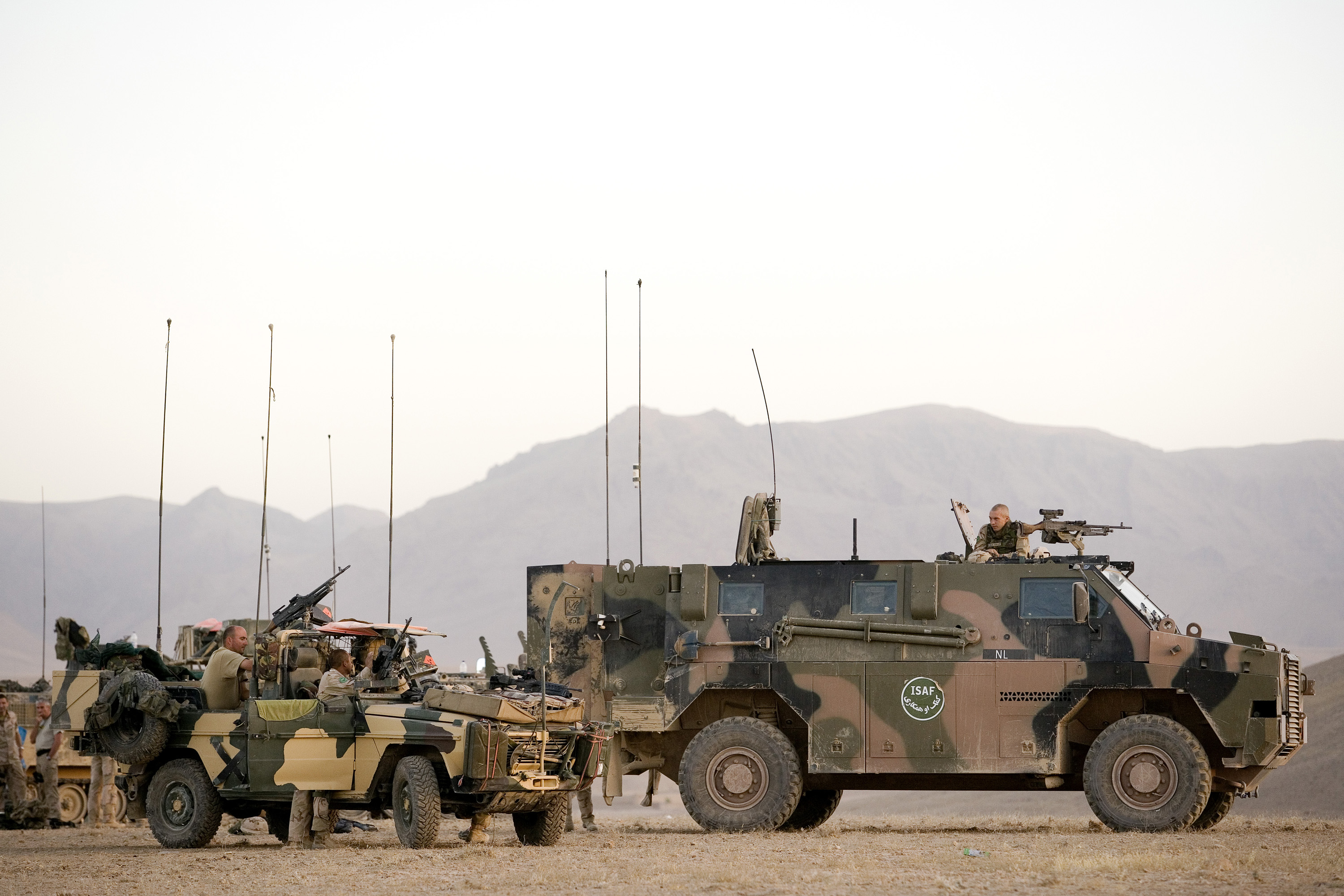 Eenheden van 42 Bataljon Limburgse jagers, in samenwerking met de Afghan National army, bezoeken in het oord Seyyedan een Quala (leefgemeenschap) om er een 'softknock' uit te voeren. Er bestaat een vermoeden dat hier IED's gehuisvest, danwel gefabriceerd worden. IED (Improvised explosive device) Uiteindelijk werden er 2 AK-47 geweren en 3 handgranaten aangetroffen, en in beslag genomen. Foto: Op een heuvel nabij Seyyedan, waar de nacht werd doorgebracht, bereiden deze infanteristen zich voor op de komende actie.